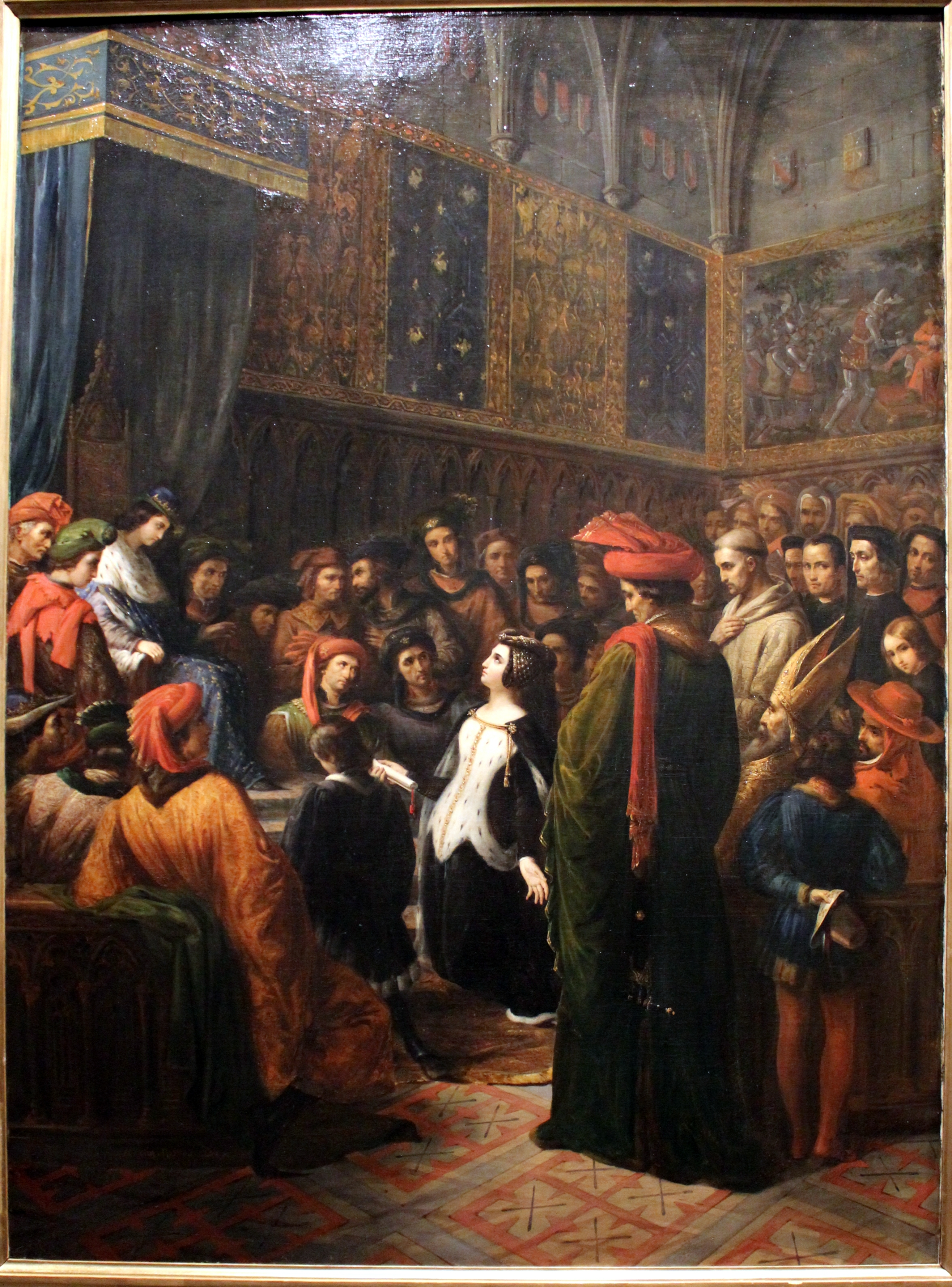 Valentine de Milan implore la justice du roi Charles VI pour l'assassinat du duc d'Orléans, tableau d'Alexandre Colin en 1836, exposé au Musée des beaux-arts de Lyon en 2014.